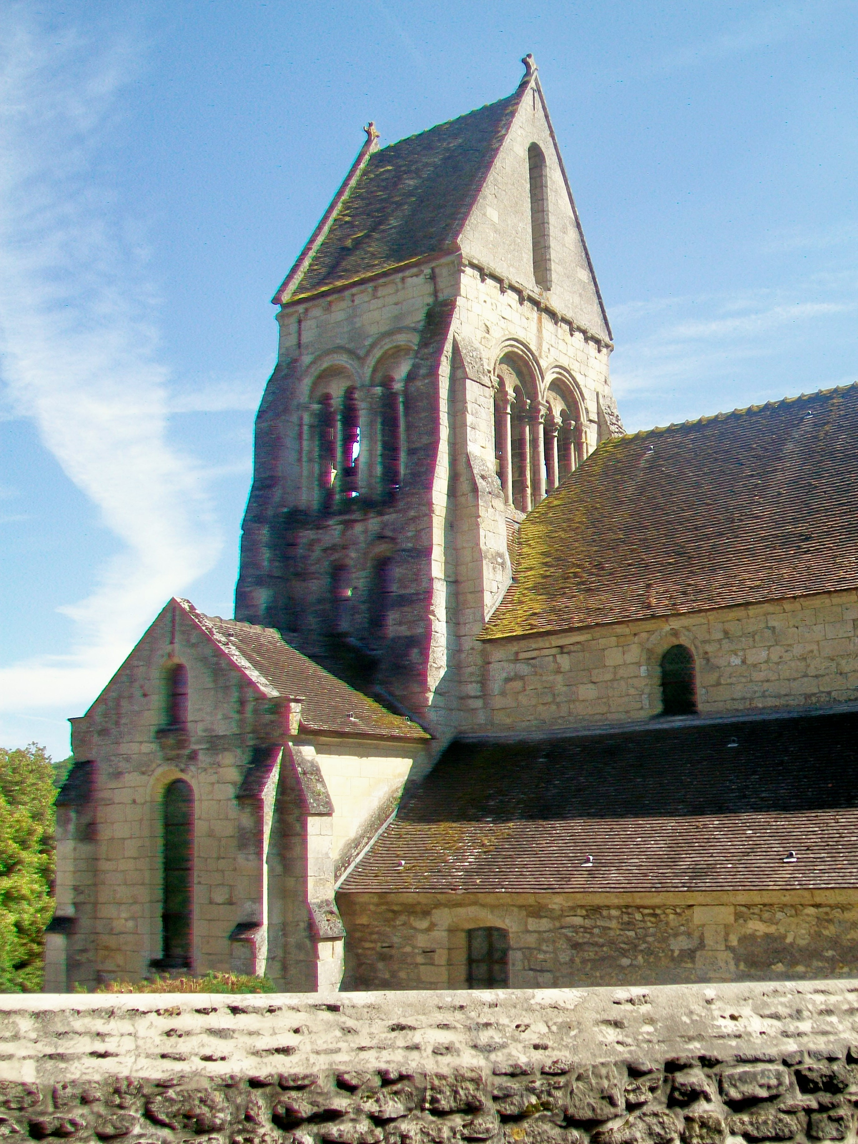 Le transept nord et le clocher.